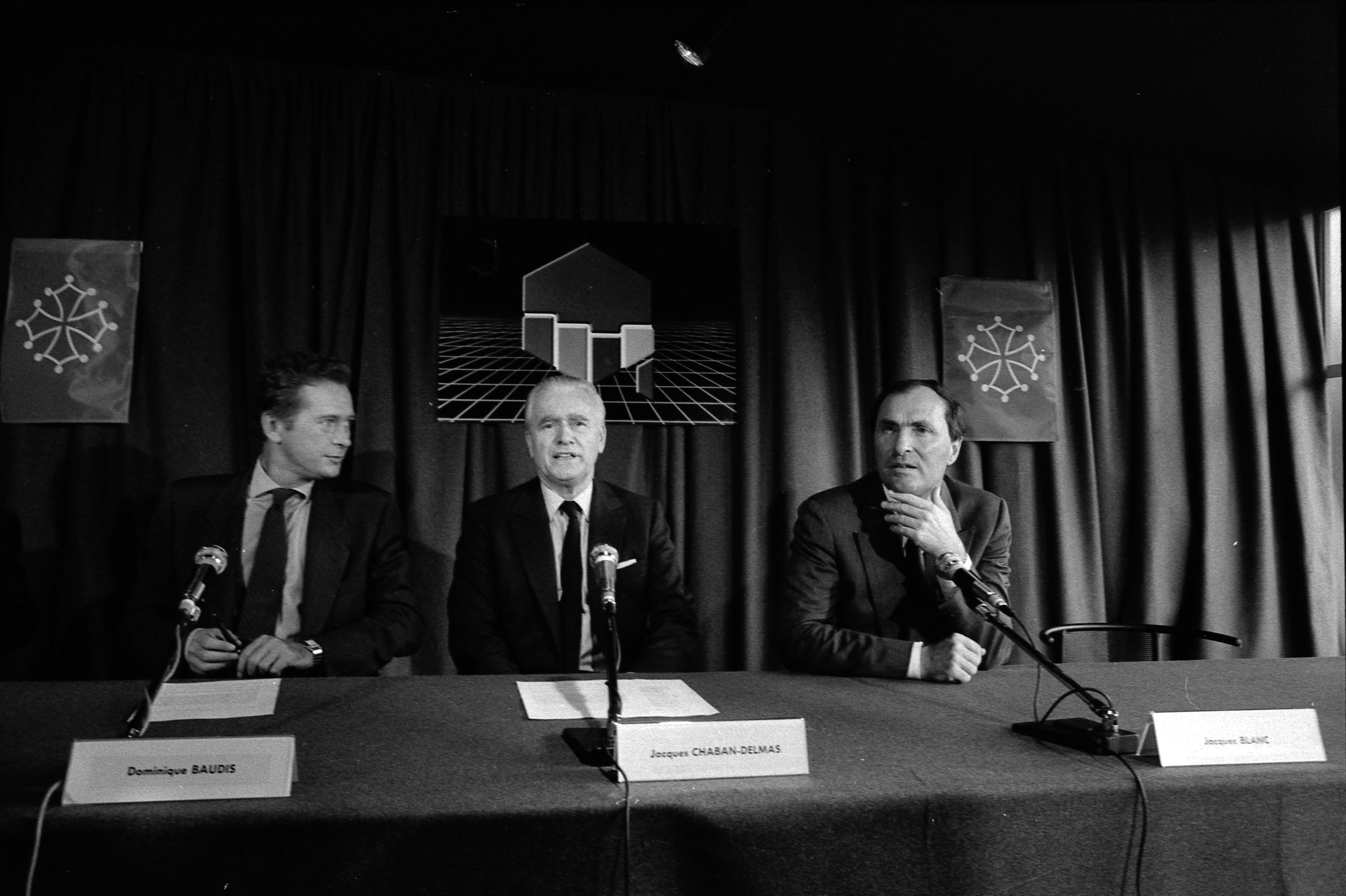 Pas de lieu. Le 10 Octobre 1987. Vue de Dominique Baudis, Jacques Chaban-Delmas et Jacques Blanc lors d'une conférence de presse.